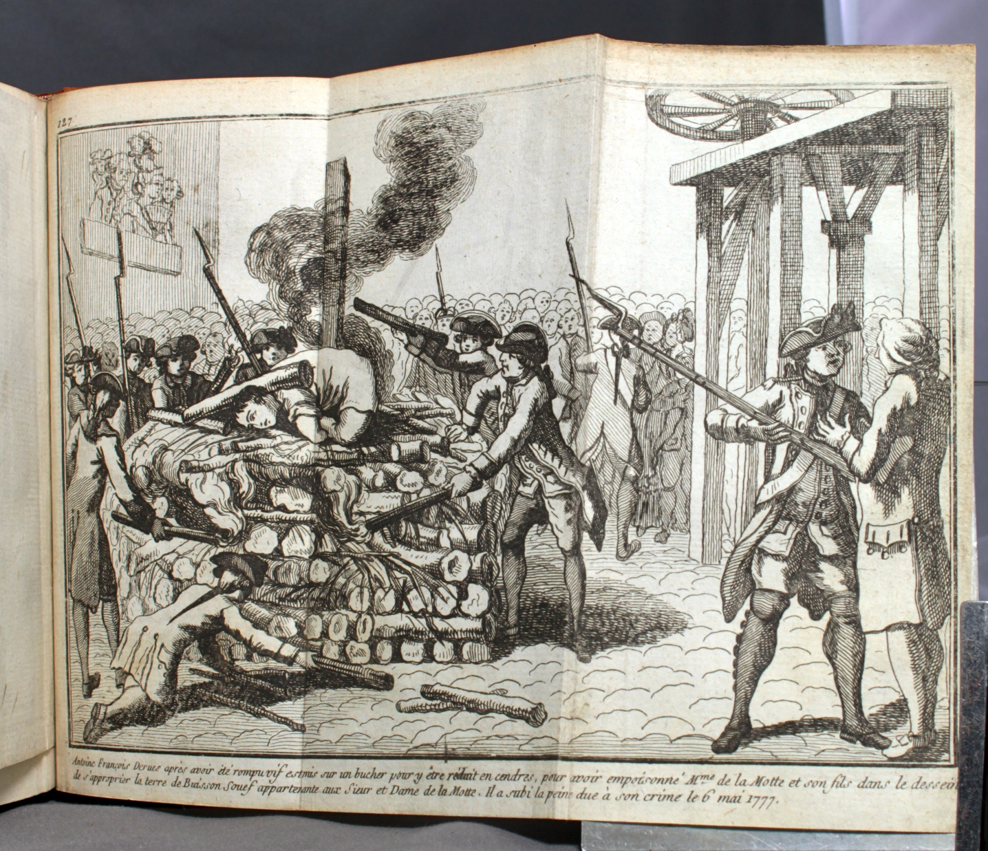 Condena muerte